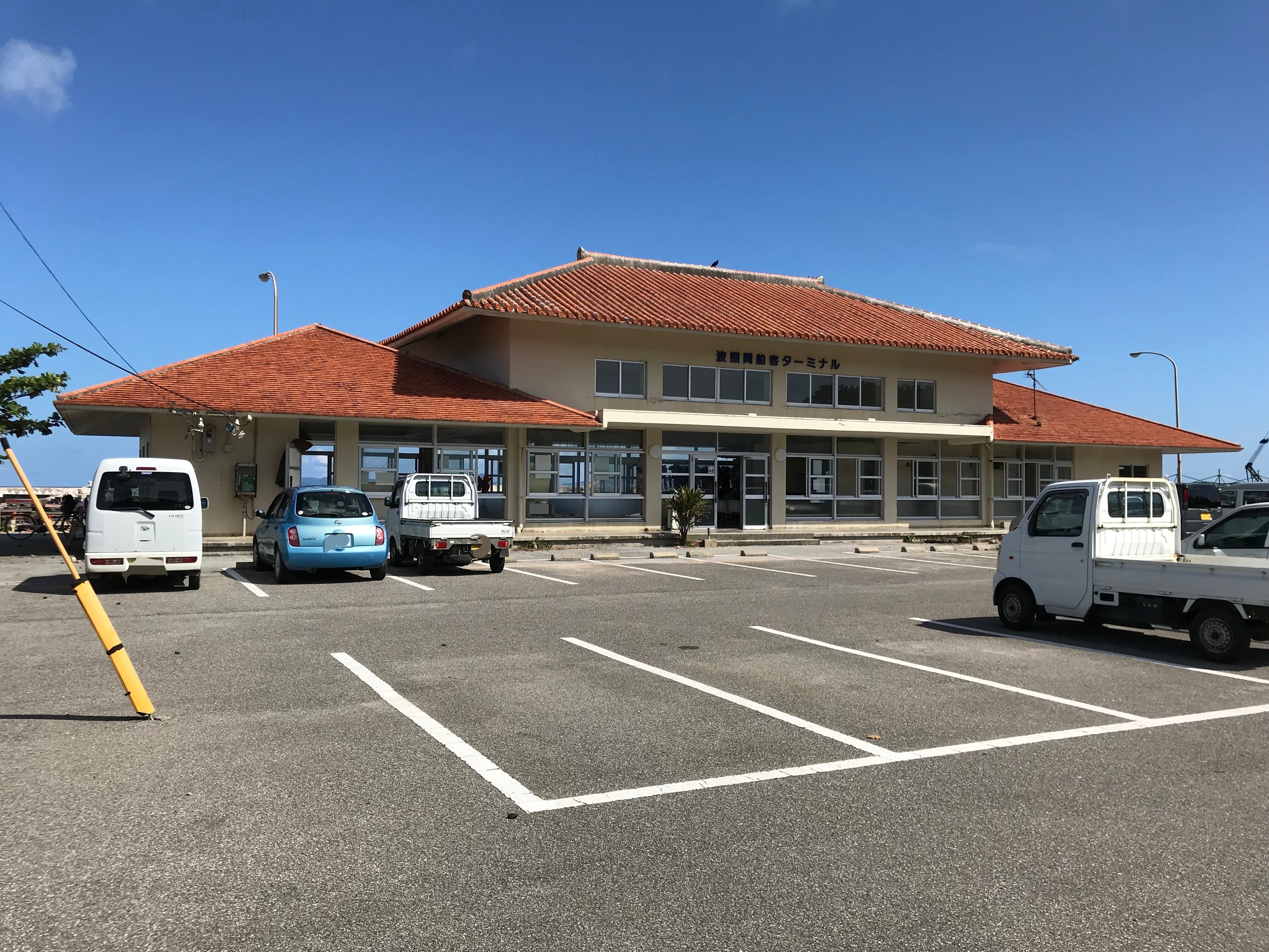 沖縄県竹富町波照間島波照間港